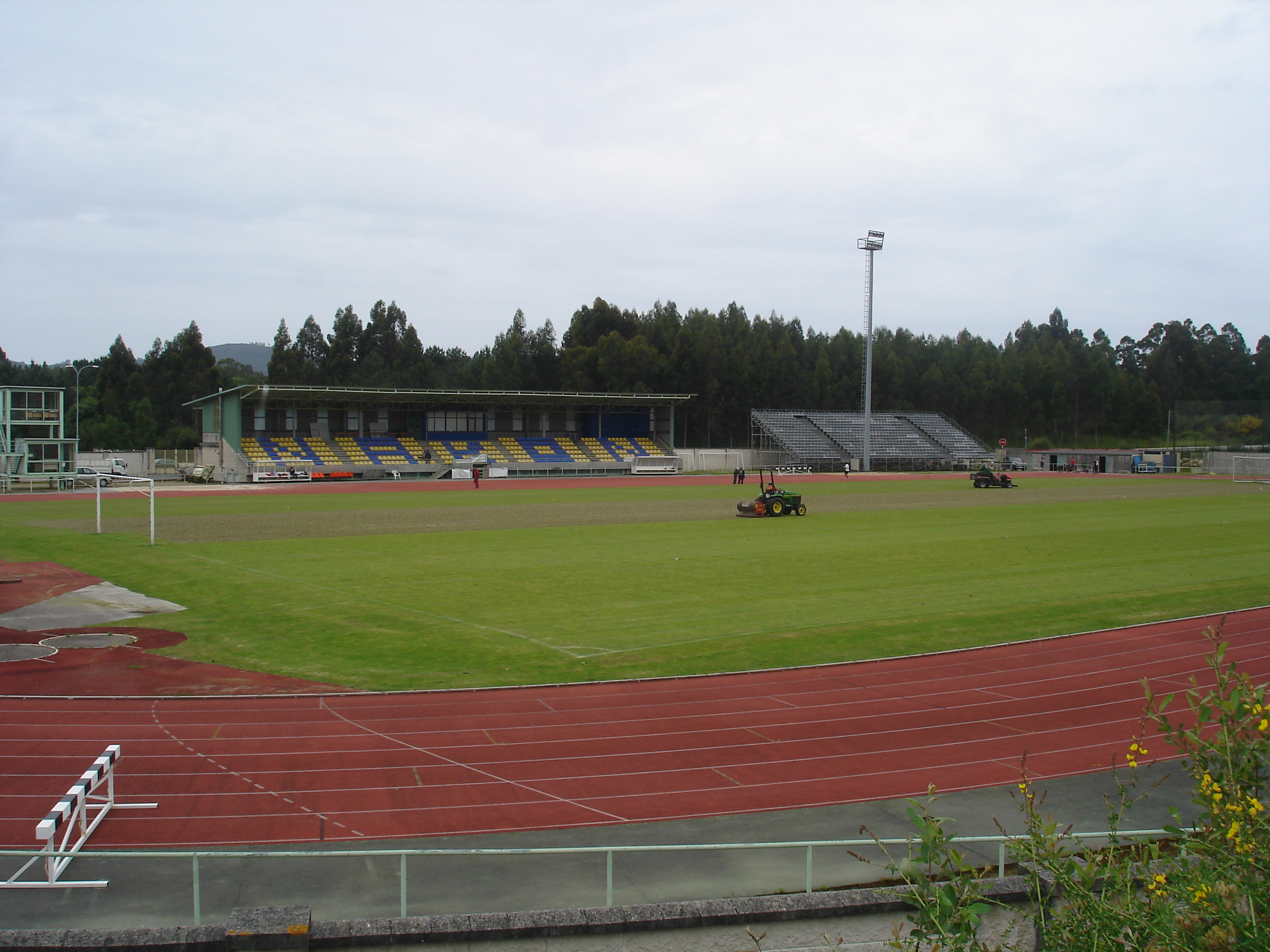 Estadio municipal de Rio Seco en Narón Categoría:Imaxes de Narón